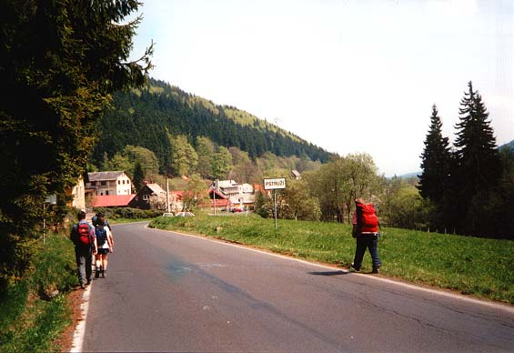 Horní konec osady Pstruží (část obce Merklín, okres Karlovy Vary) ve směru od Perninku